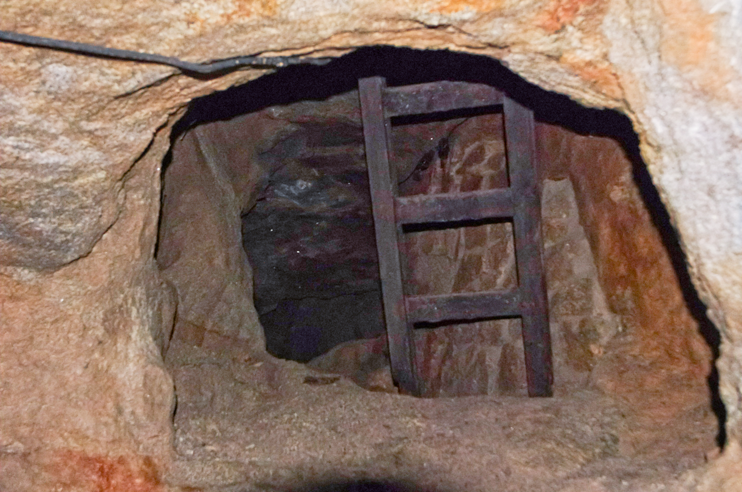 Rudný důl cínový, Jeroným (Čistá), Čistá